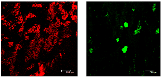 Fig. 2. Estado de morfología y diferenciación de los cultivos de WD-PNEC de nacimiento y repetición de un año. B) Un año de edad: Microscopía confocal los paneles cuadrados representan imágenes en la cara, (aumento x63, con zoom digital x1.5). Tinción de β-tubulina (marcador de células ciliadas en rojo), Muc5Ac (marcador de células caliciformes en verde). Barra de escala= 20 μm).